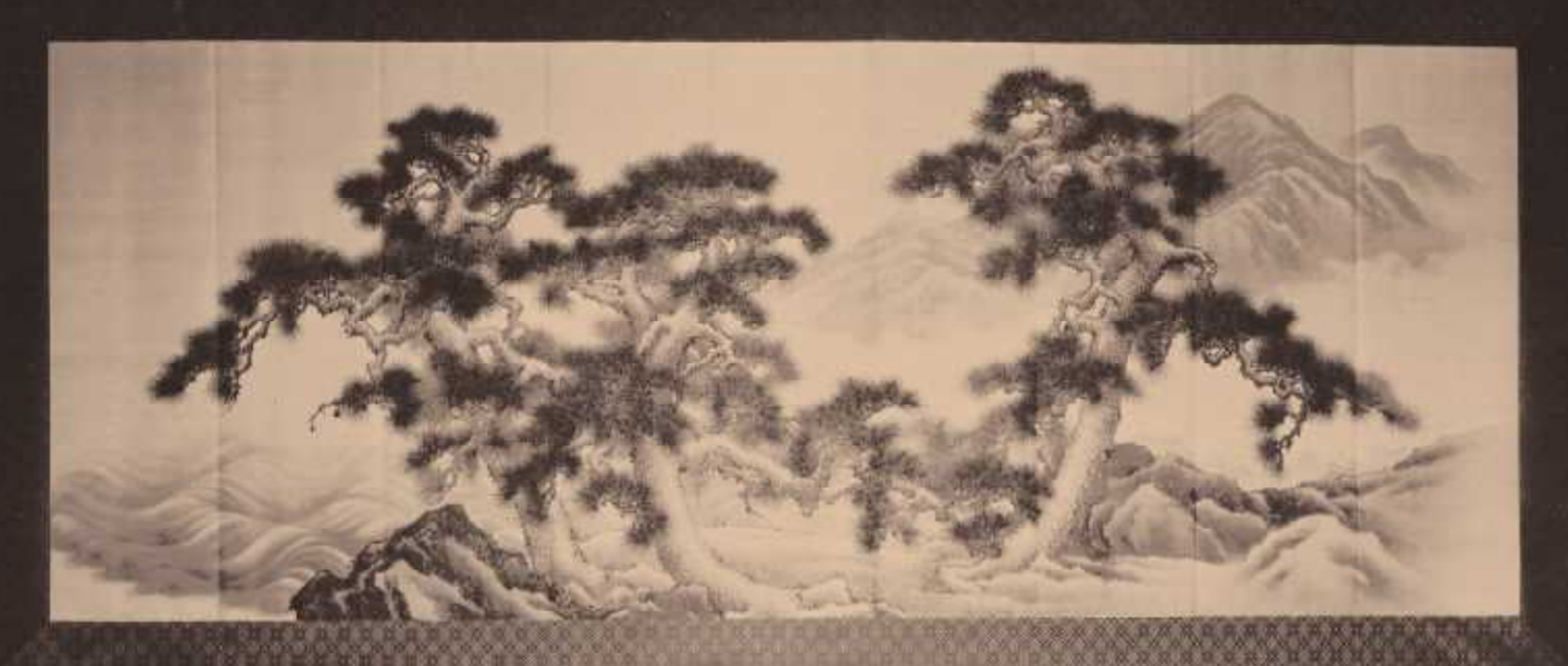 錦軟障。図柄は千年松山水の図。錦軟障は帝室技芸員の今尾景年の筆によって絹に揮毫した墨絵で大正大礼の際調製したものである。昭和大礼及び平成大礼の際にも使用された。